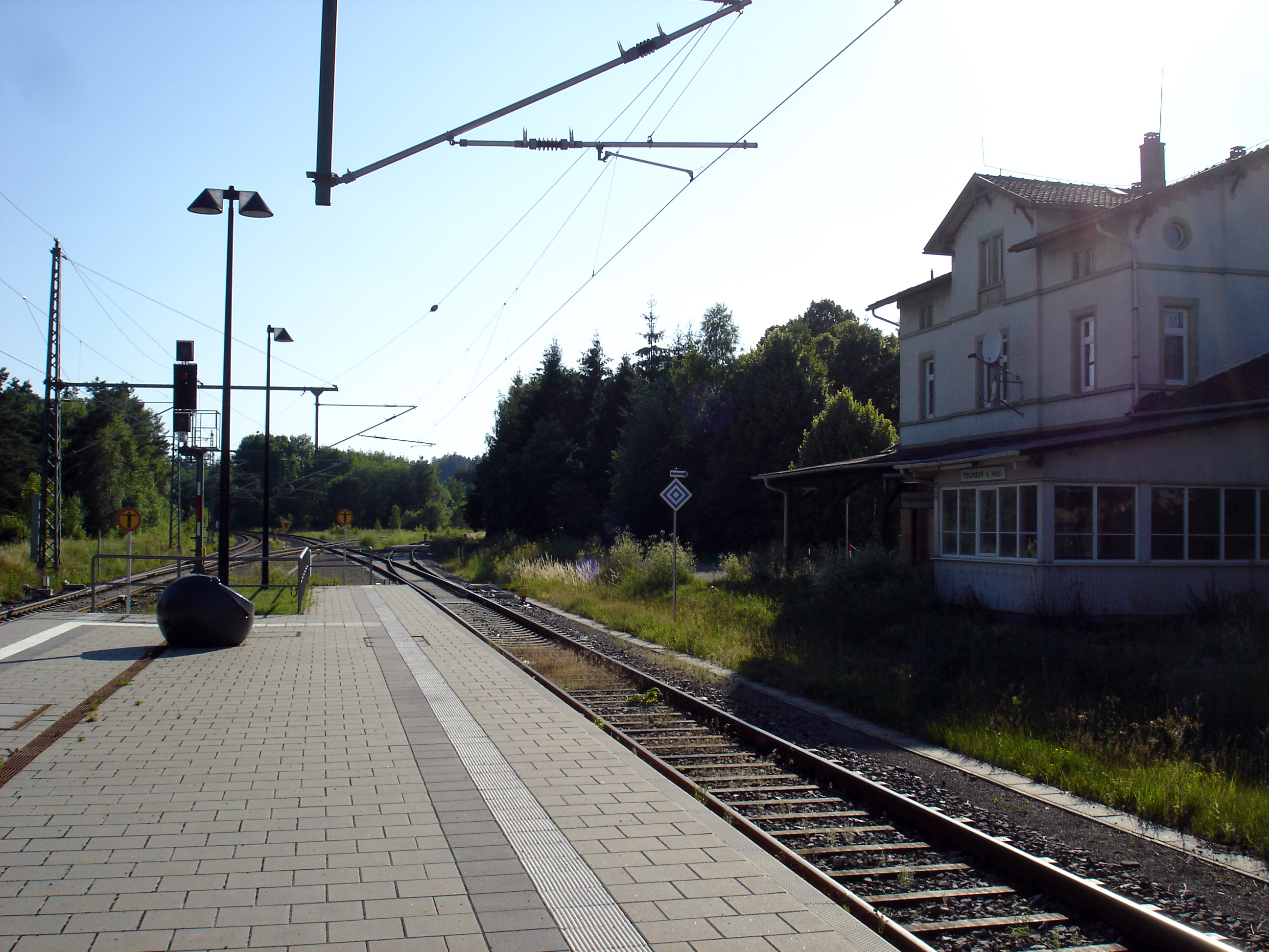 Bahnhof mit Gleisanlagen